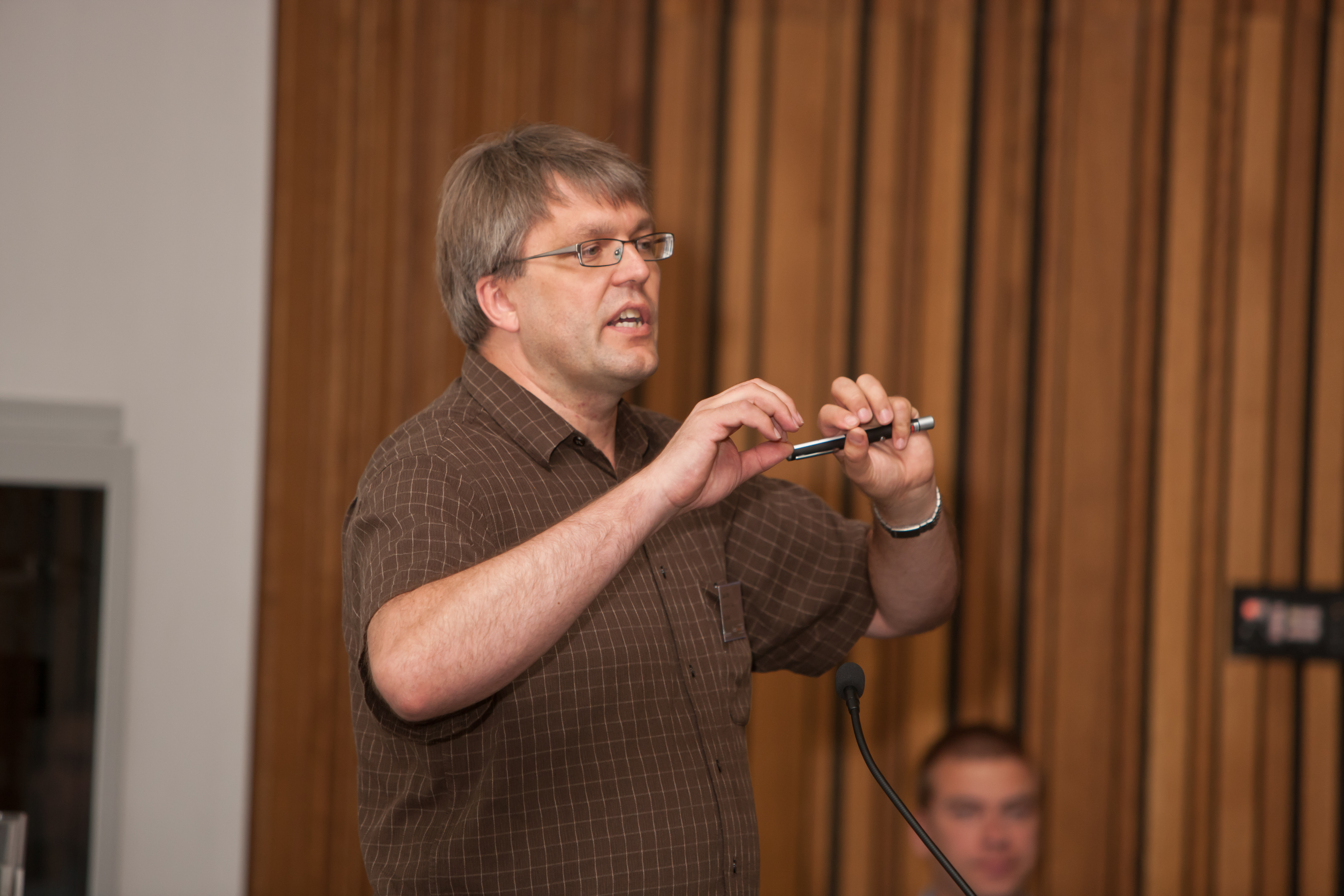 10.-11. juunil 2011 toimus Tartus üheteistkümnes rahvusvaheline genoomika ja biomeditsiini alane teaduskonverents alapealkirjaga “Kompleksfenotüüpide geneetika”. 2. päev. Esineb Tartu Ülikooli bioinformaatika professor Jaak Vilo.